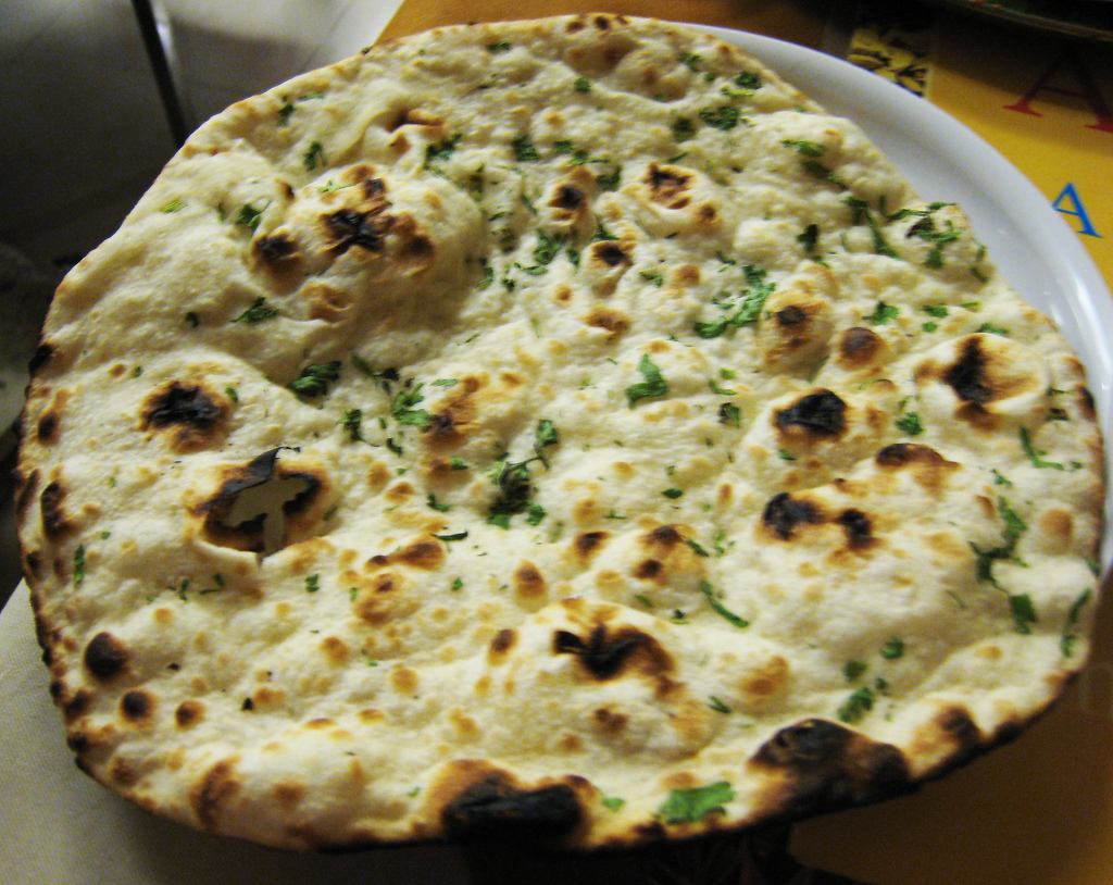 Kulcha